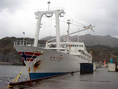 Camellia Maru at Kozushima Port, Tokyo, Japan